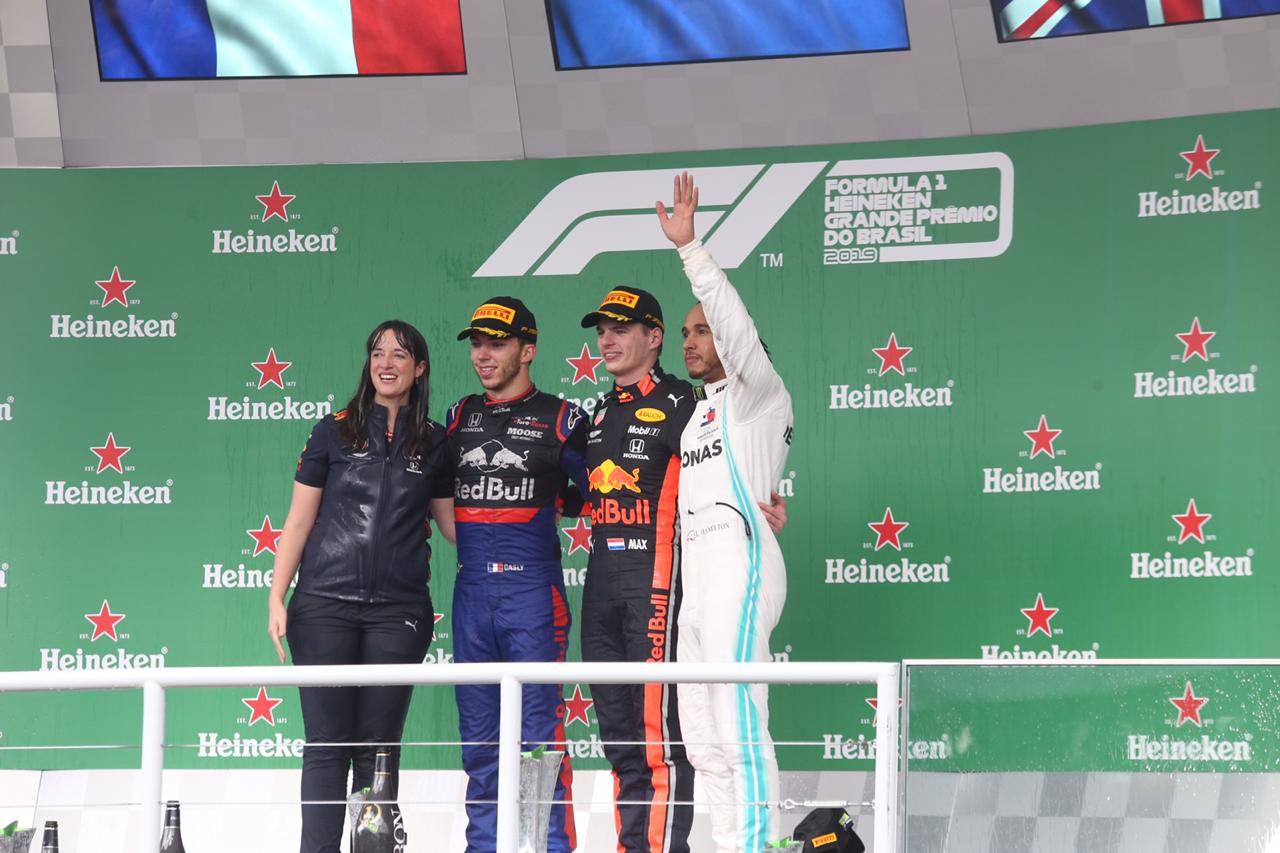 Governador do Estado de São Paulo, João Doria, durante Grande Prêmio do Brasil de F1 2019. Local: São Paulo/SP. Data: 17/11/2019